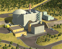 Vue d'artiste du réacteur Jules Horowitz